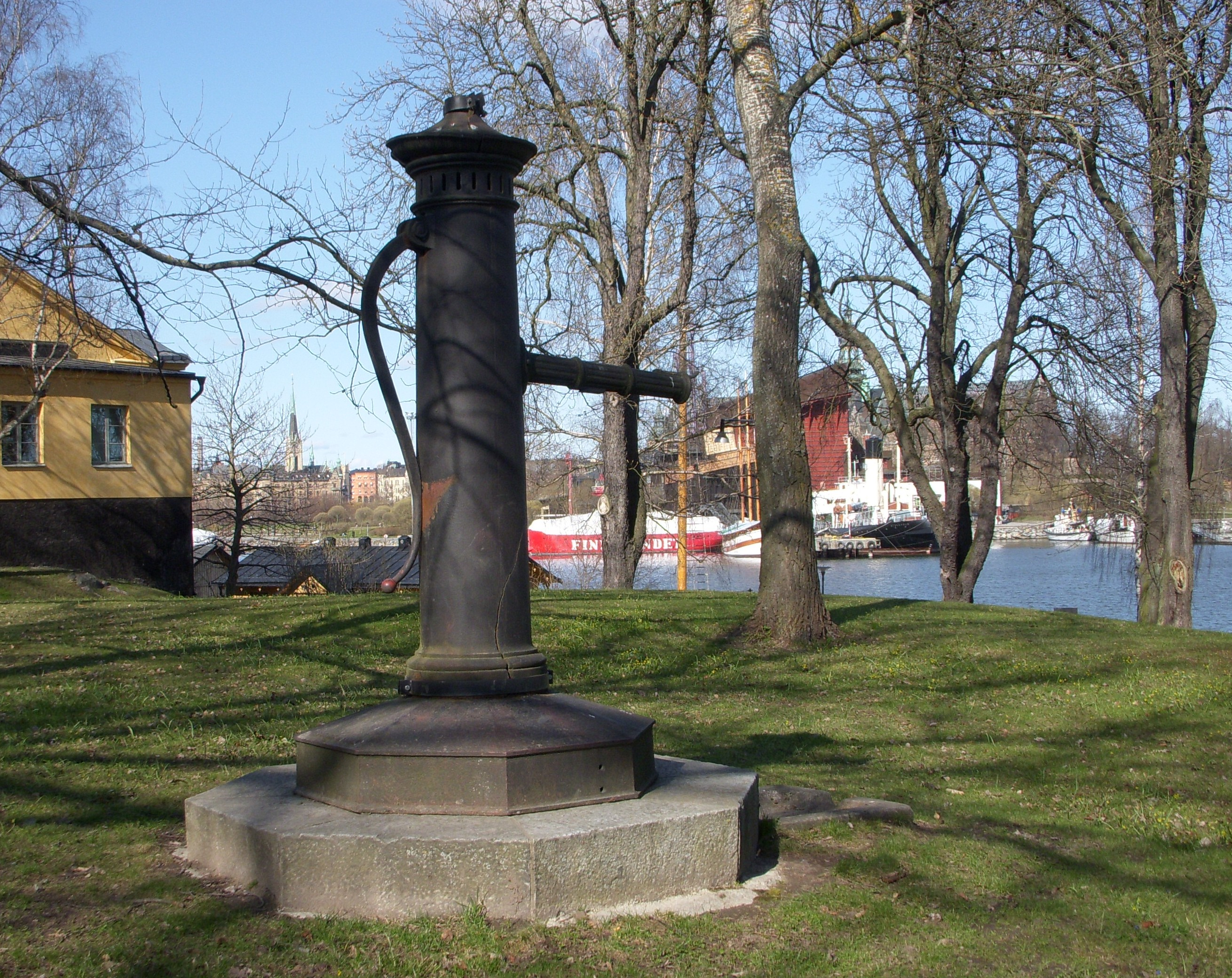 "Caisa Rultas källa" eller "Caisa Rultas pump" på Skeppsholmen i Stockholm